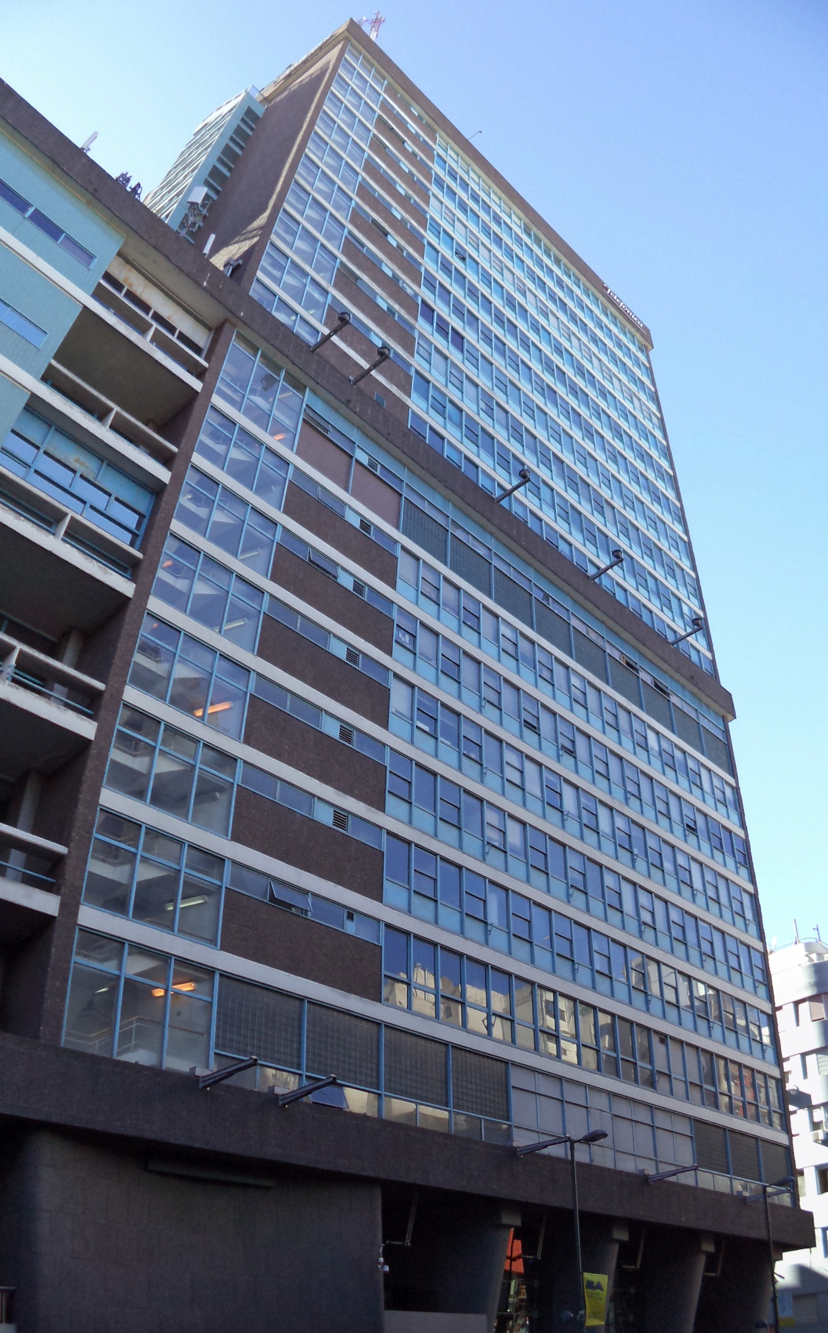 Fachada del Edificio República, construido para ENTEL (hoy Telefónica) en Buenos Aires.